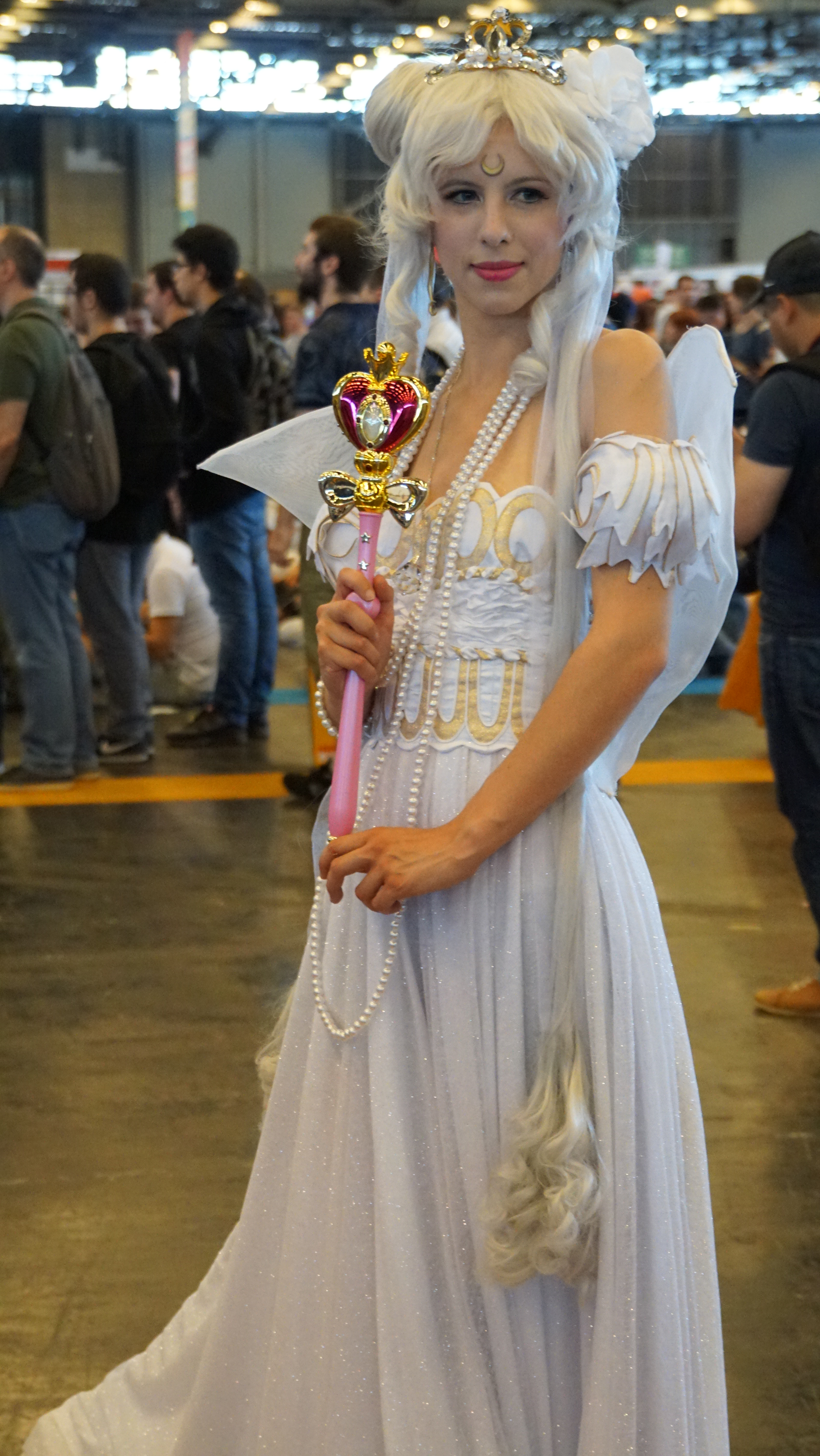 Japan Expo est un salon evenementiel professionnel francais sur la culture populaire japonaise, qui se deroule au parc des expositions de Paris-Nord Villepinte tous les ans en debut du mois de juillet, voire en fin du mois de juin sur une periode de quatre jours. Il s'agit d'une manifestation culturelle consacree aux manga, aux jeux video, aux anime, mais aussi aux arts martiaux, a la mode, a la musique (J-pop, Jrock, traditionnel), au cinema, aux traditions et cultures, aux jeunes artistes et createurs, au sport mecanique.